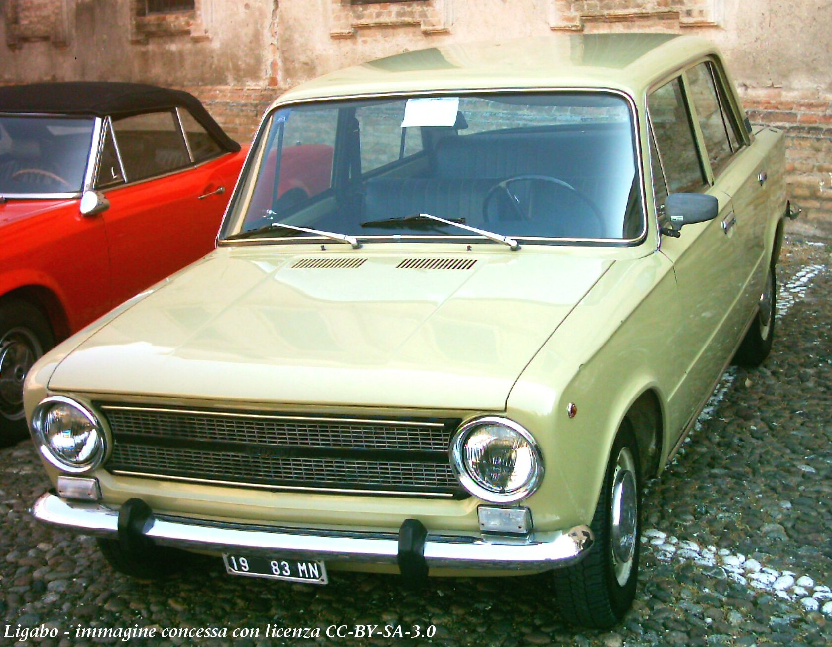 Fiat 124 berlina del 1973 fotografata al Raduno Auto Storiche di Medole nel 2007